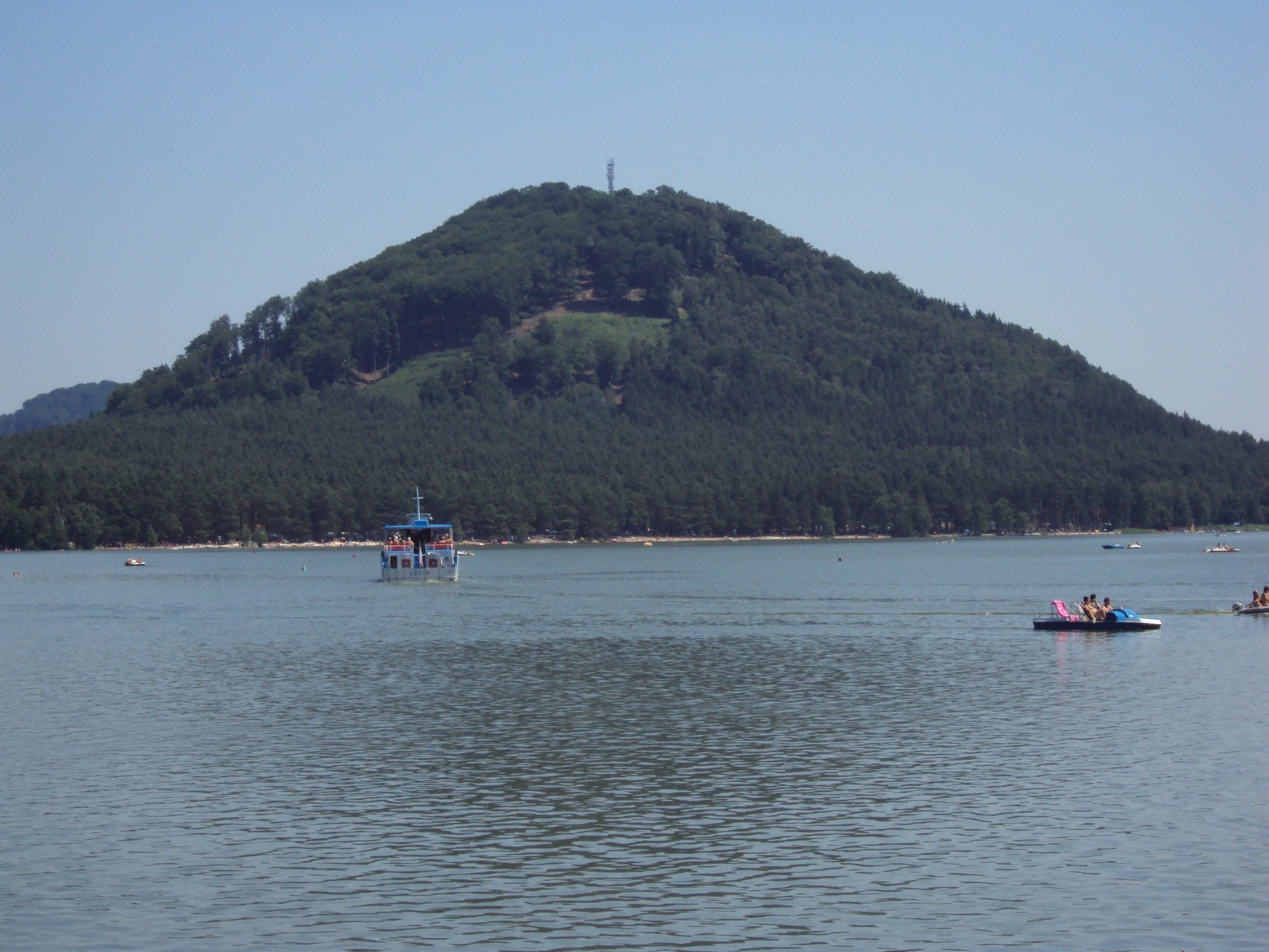 Vrch Borný u Máchova jezra